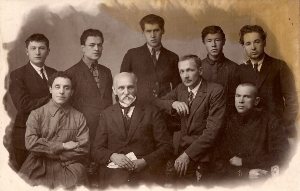 Беларускія пісьменнікі на сустрэчы з Янам Райнісам. Сядзяць (злева направа): З. Бядуля, Я. Райніс, Я. Купала, К. Крапіва. Стаяць: Я. Пушча, А. Бабарэка, У. Дубоўка, П. Глебка, К. Чорны. 19 лістапада 1926 г. З фондаў БДАМЛМ.